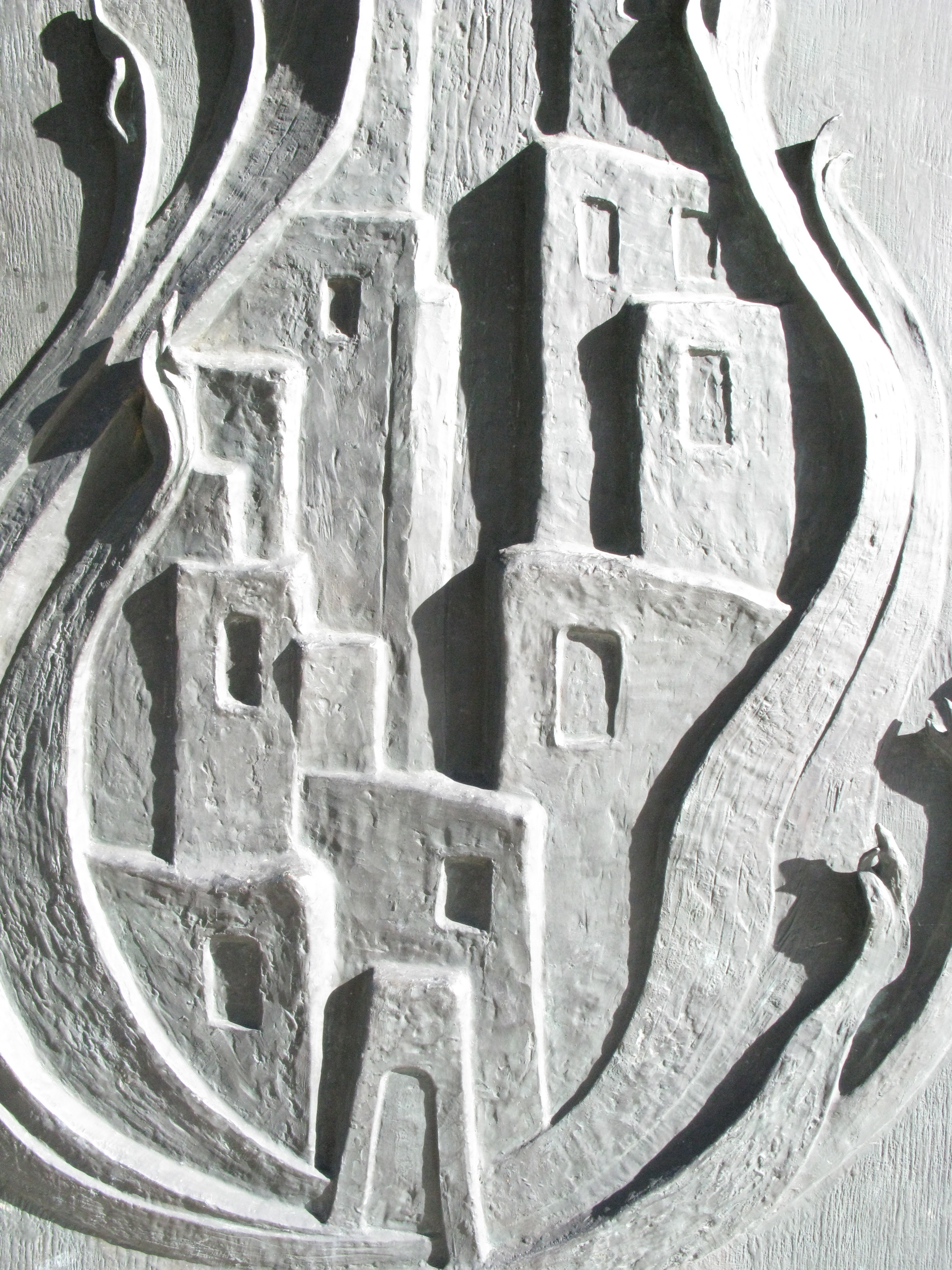 Detail des Bronzeportals der Stadtkirche Pforzheim